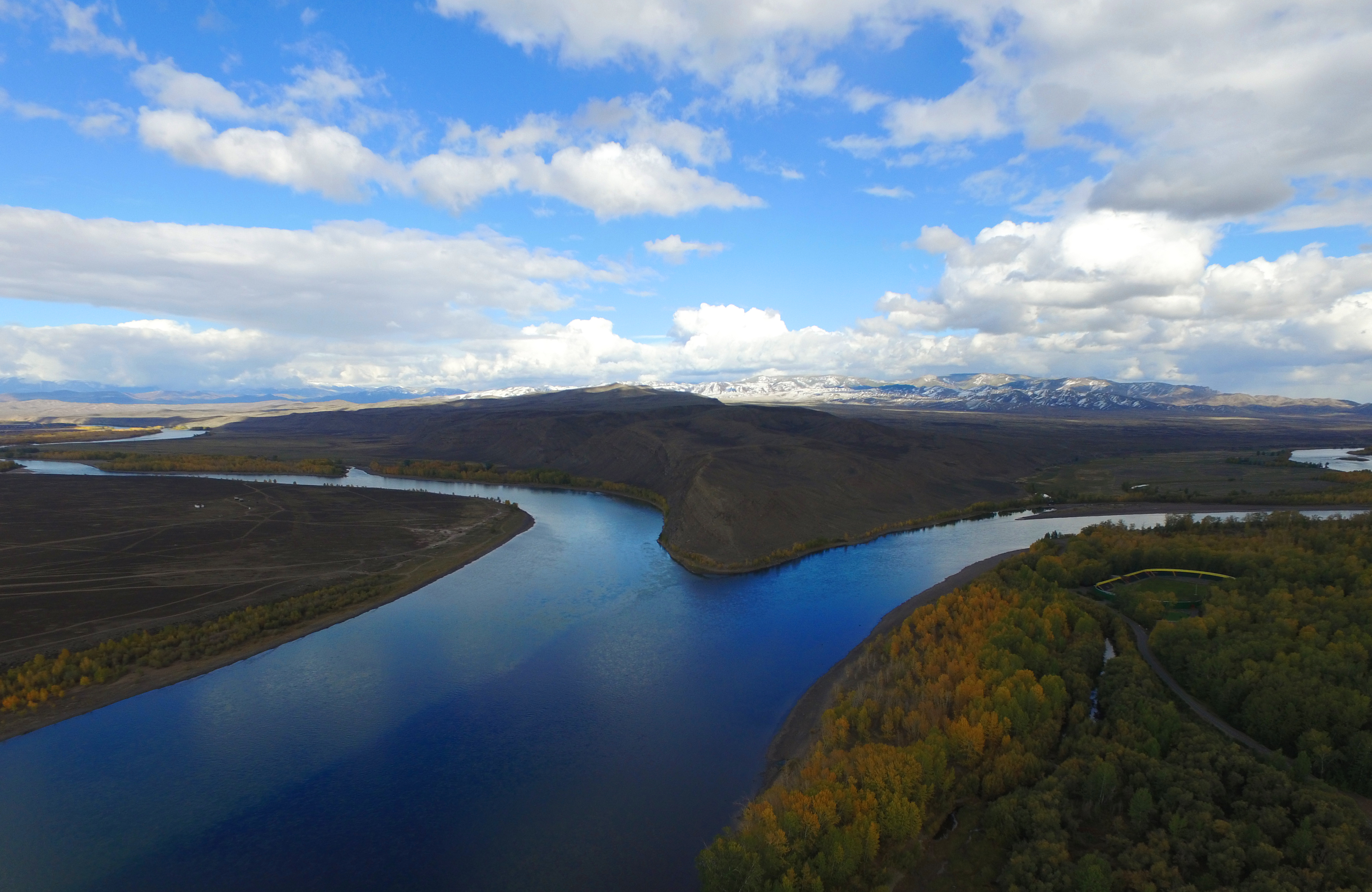 Слияние рек Каа-Хем и Пий-Хем с высоты птичьего полета